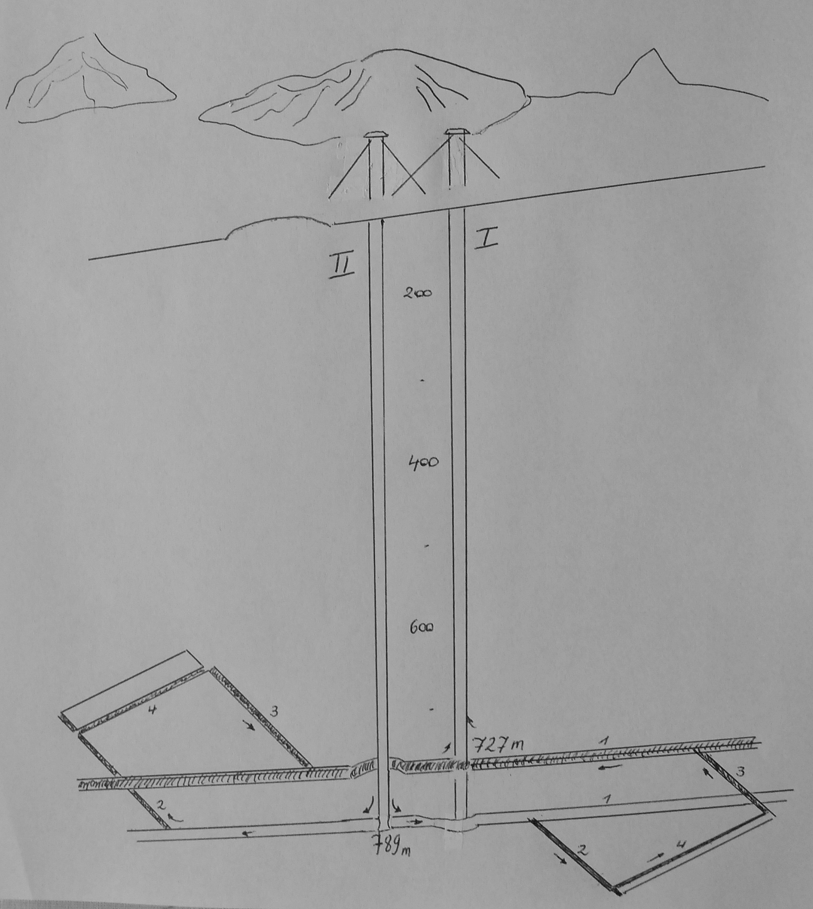 Eigen tekening van een Kempense mijnzetel volgens een afbeelding van Bert Van Doorslaer in het boek Een eeuw steenkool in Limburg van Luc Minten, Ludo Raskin, Antoon Soete, Bert Van Doorslaer en Francis Verhees